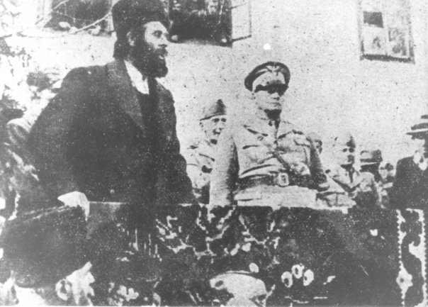 Srpskohrvatski / српскохрватски: Đurišić drži udvorički govor u čast Pirzia Birolija, italijanskog guvernera Crne Gore.